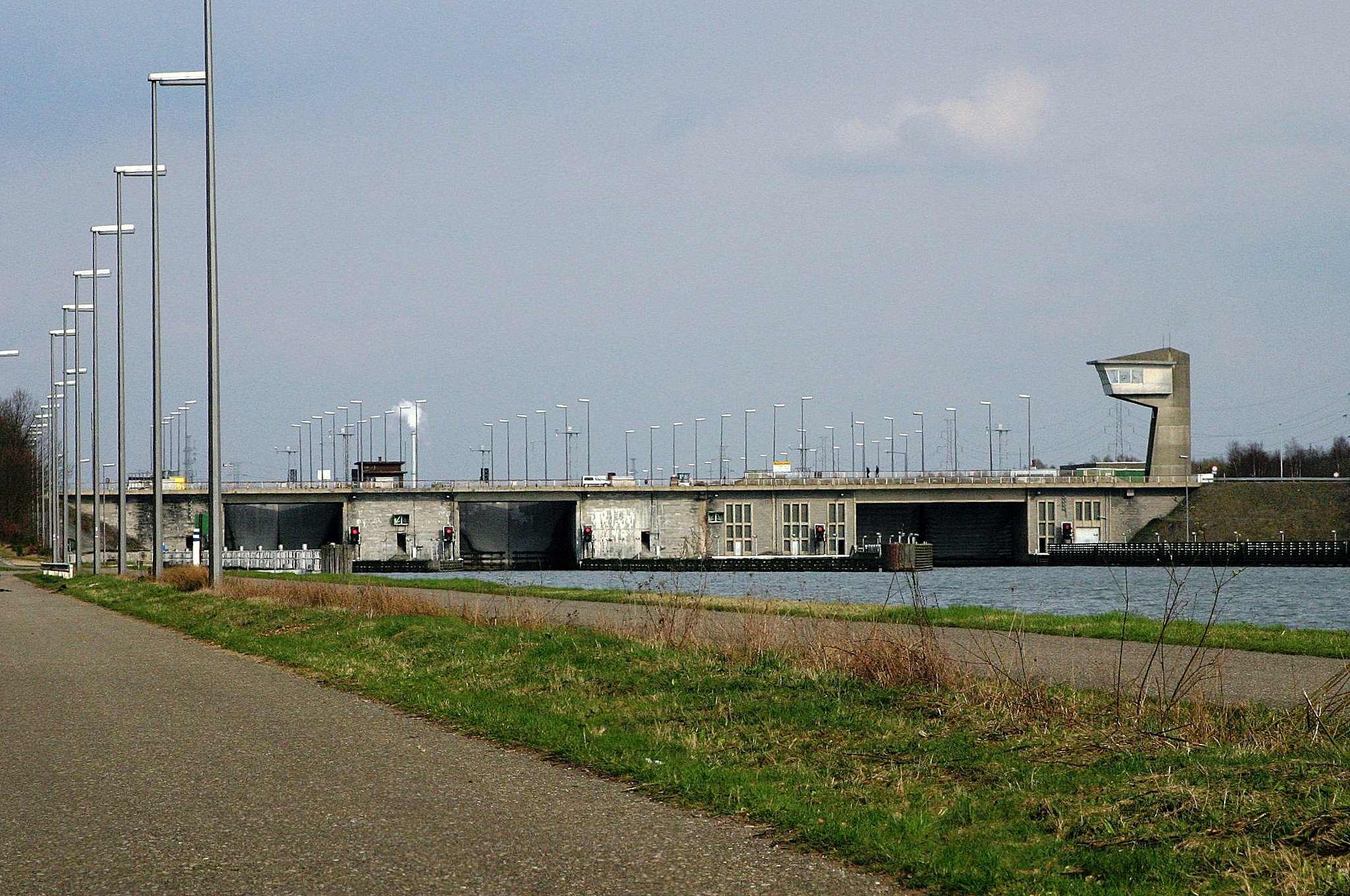 D'Schleis an d'Bréck vun Diepenbeek